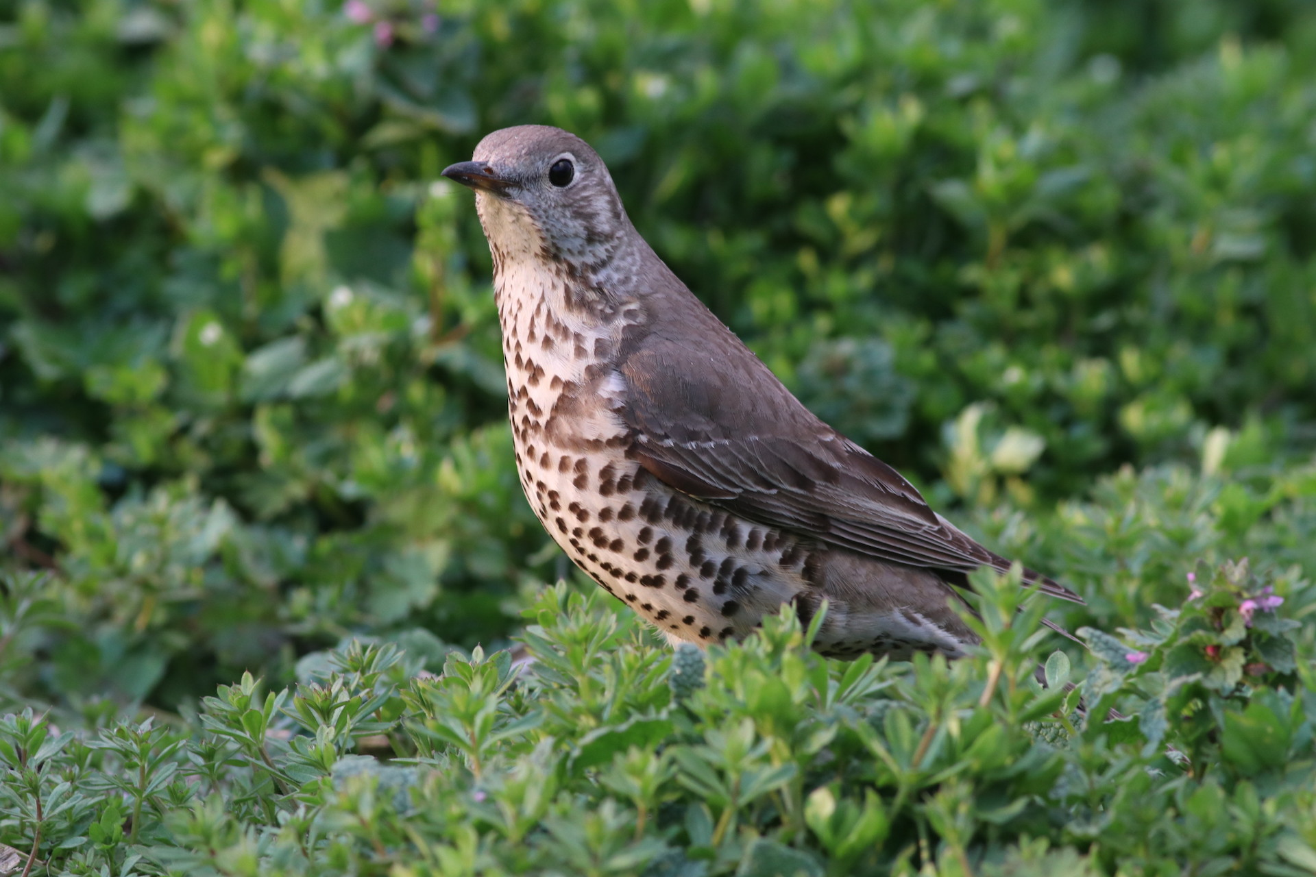 Mistle Thrush : Manno town. Kagawa Pref. Japan ヤドリギツグミ：香川県内で撮影